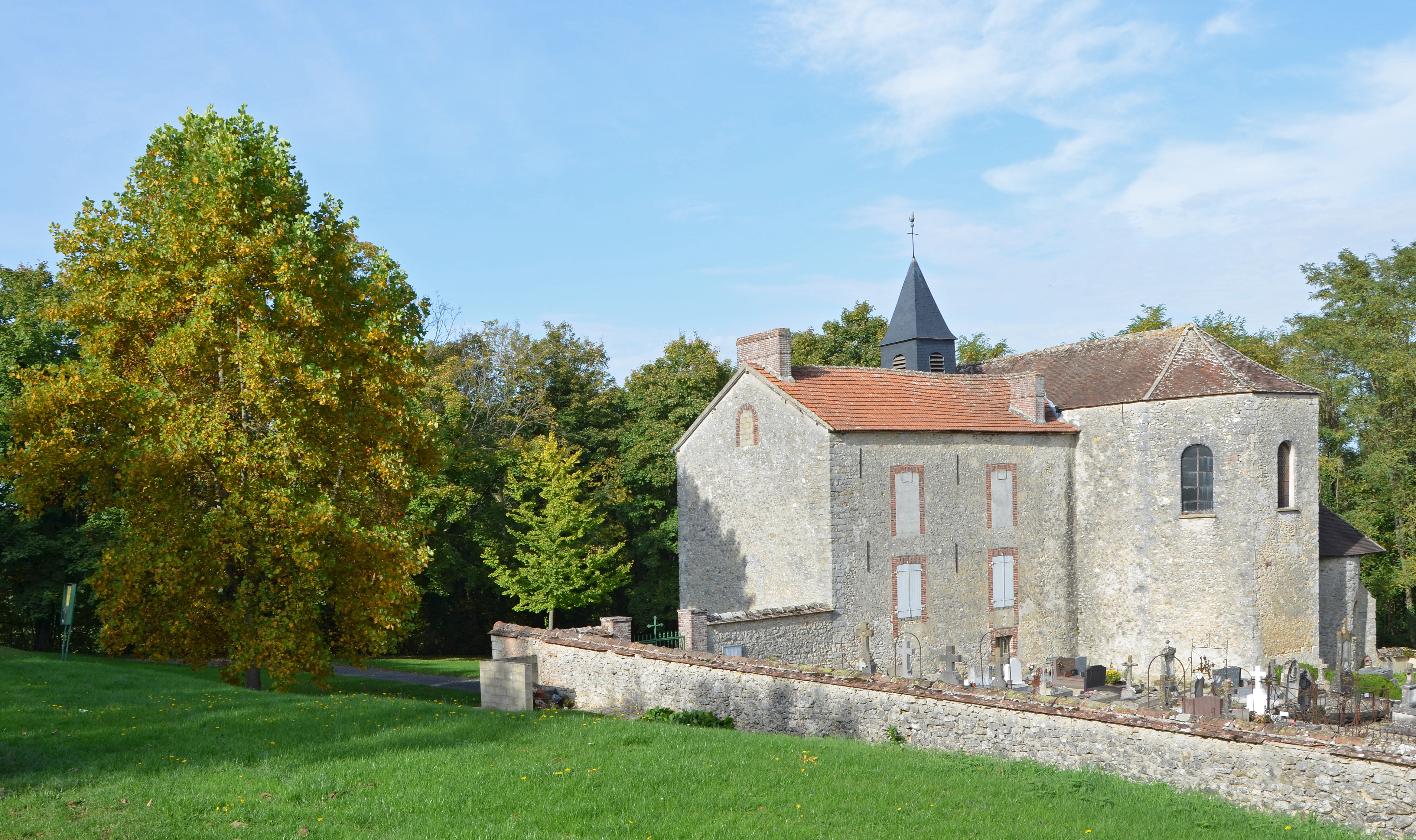 Eglise de Soisy-Bouy, Seine-et-Marne, Ile de France, France